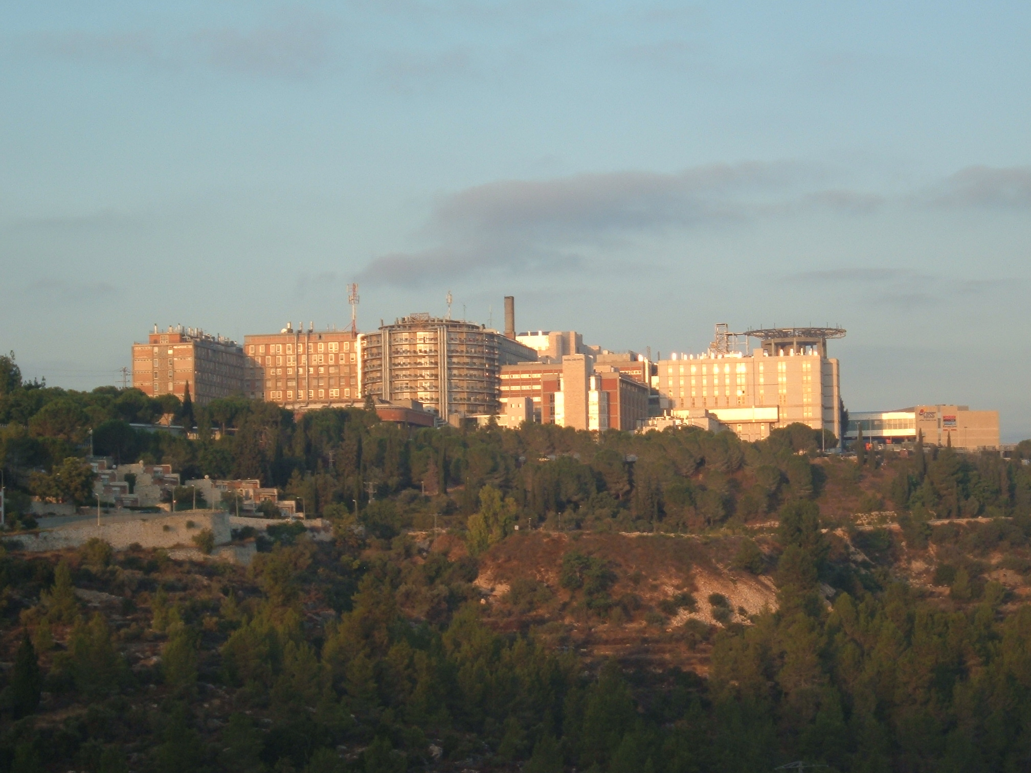 hadassa ein karem hospital in Jerusalem, Israel. בית החולים הדסה עין כרם בירושלים, מבט משכונת עין כרם